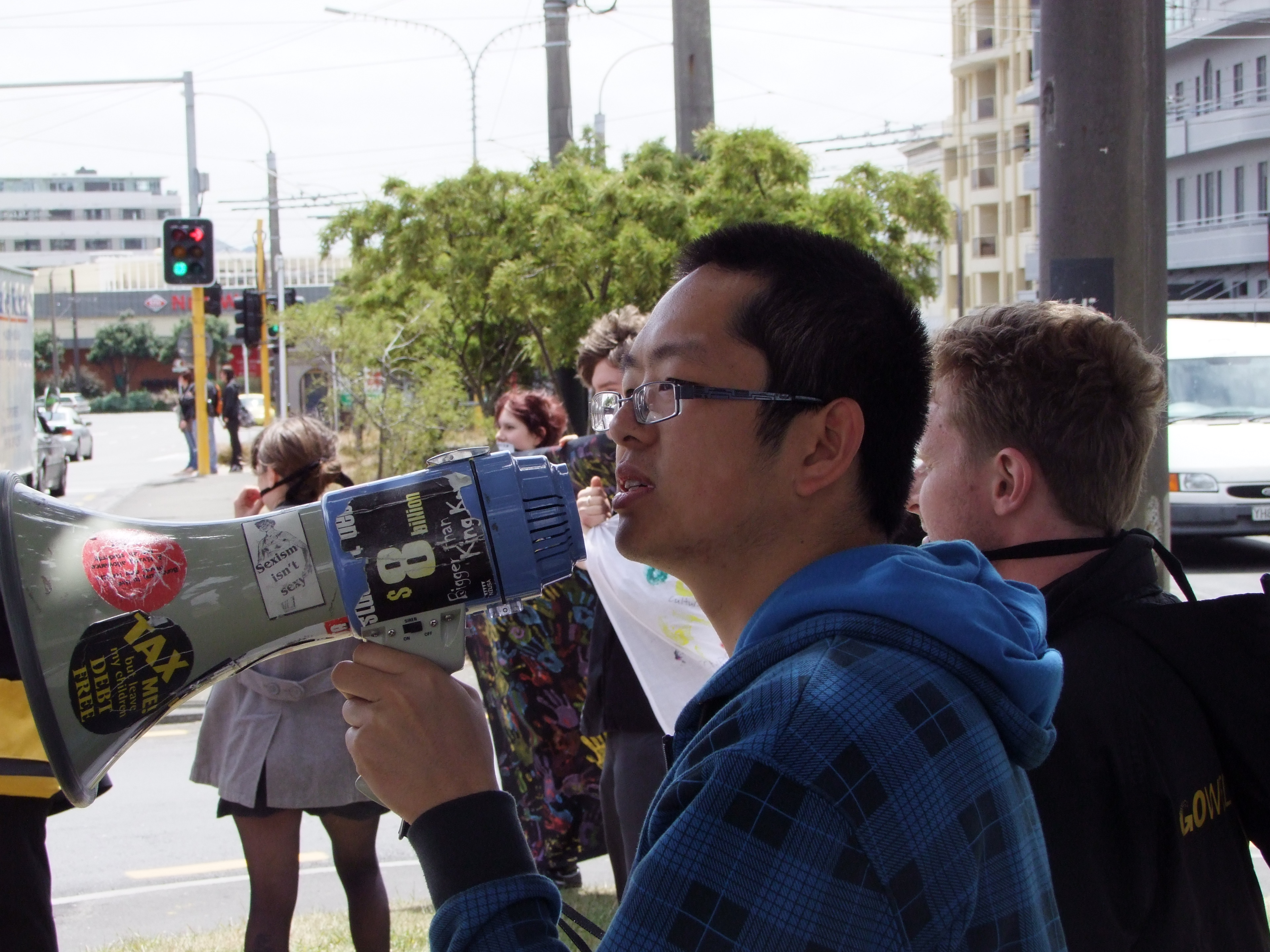 David Do